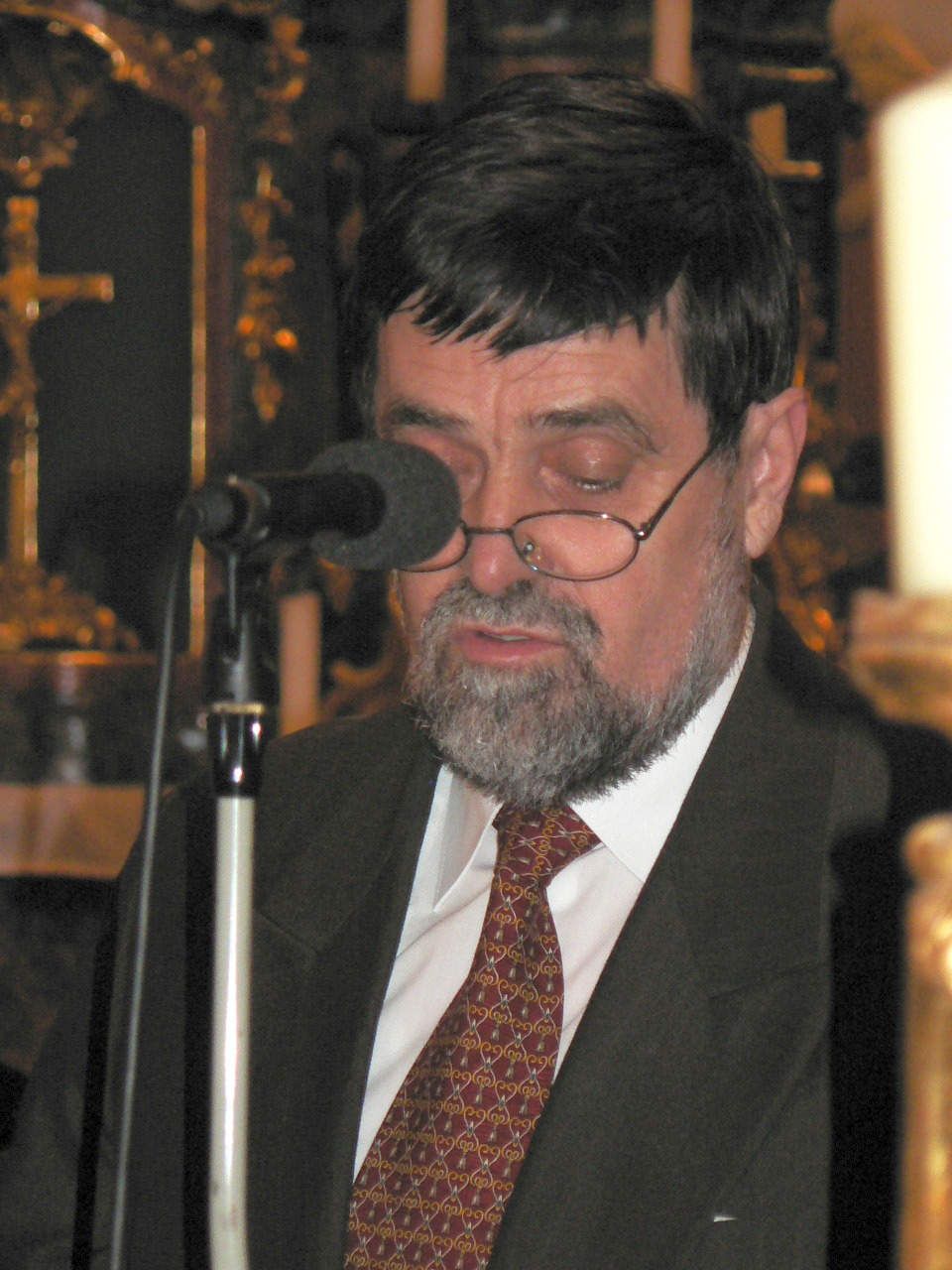 Enczmann László templomi köszöntőt mond 2006 februárjába